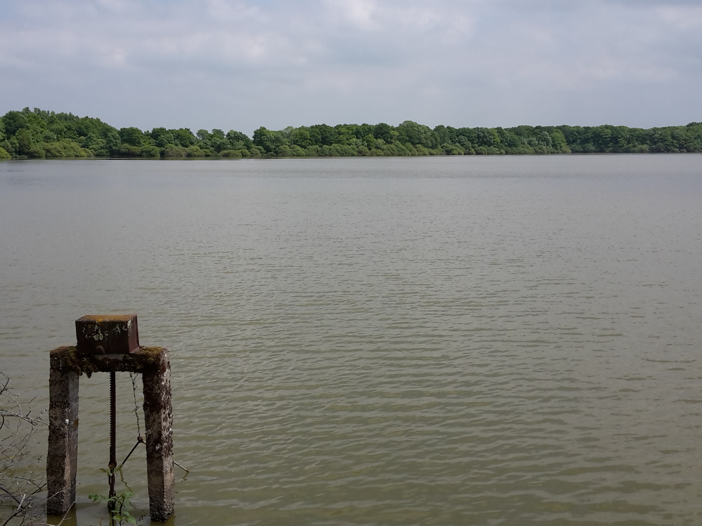 Etang du Pin, Loire-Atlantique, France.